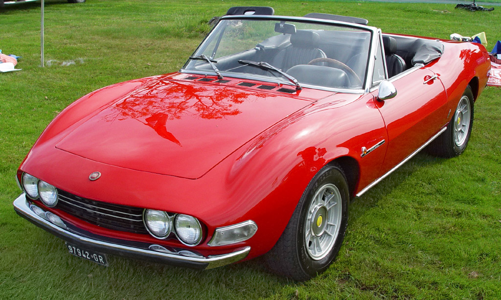 1970 Fiat Dino 2400 Spider